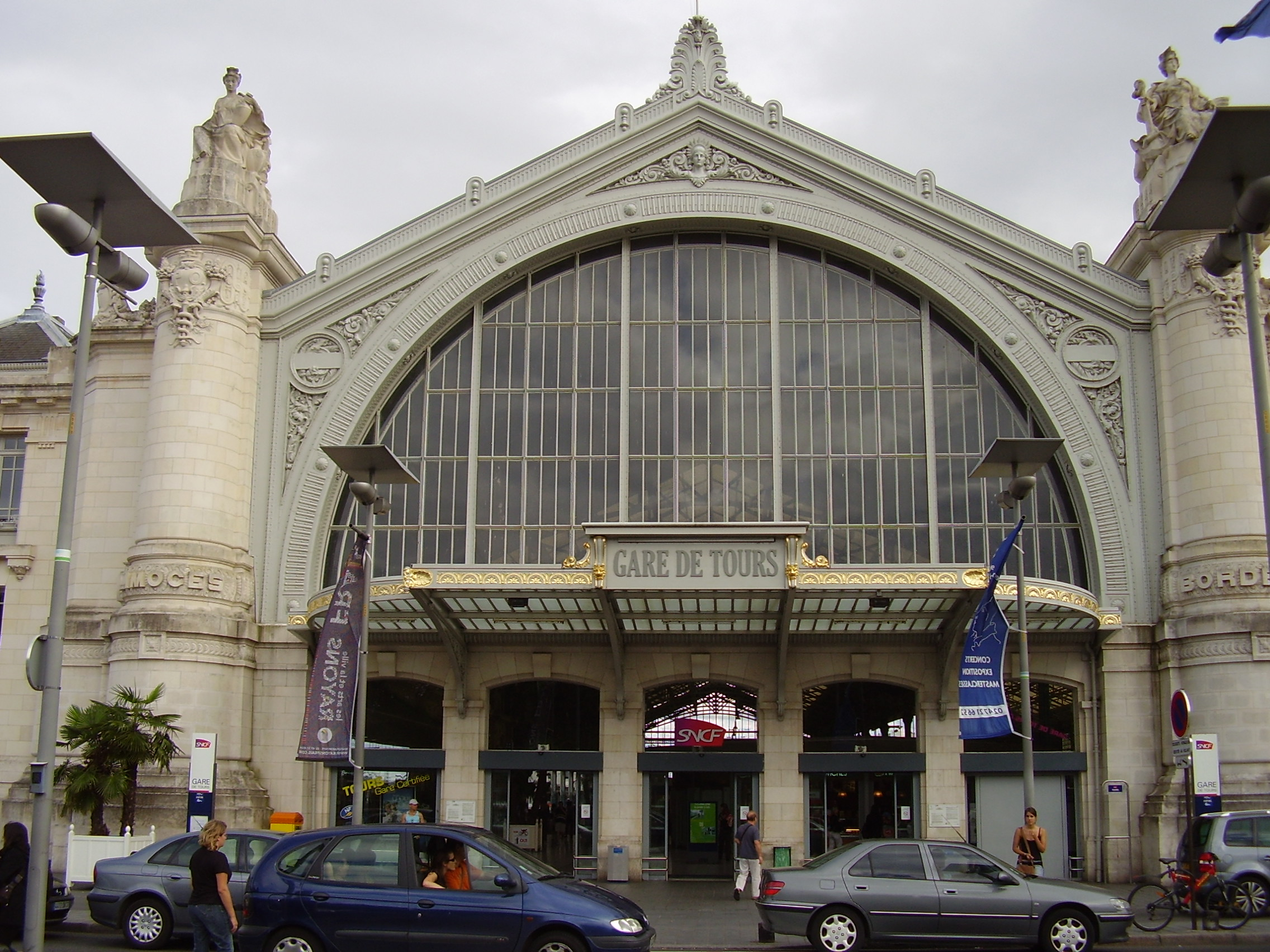 Tours, France